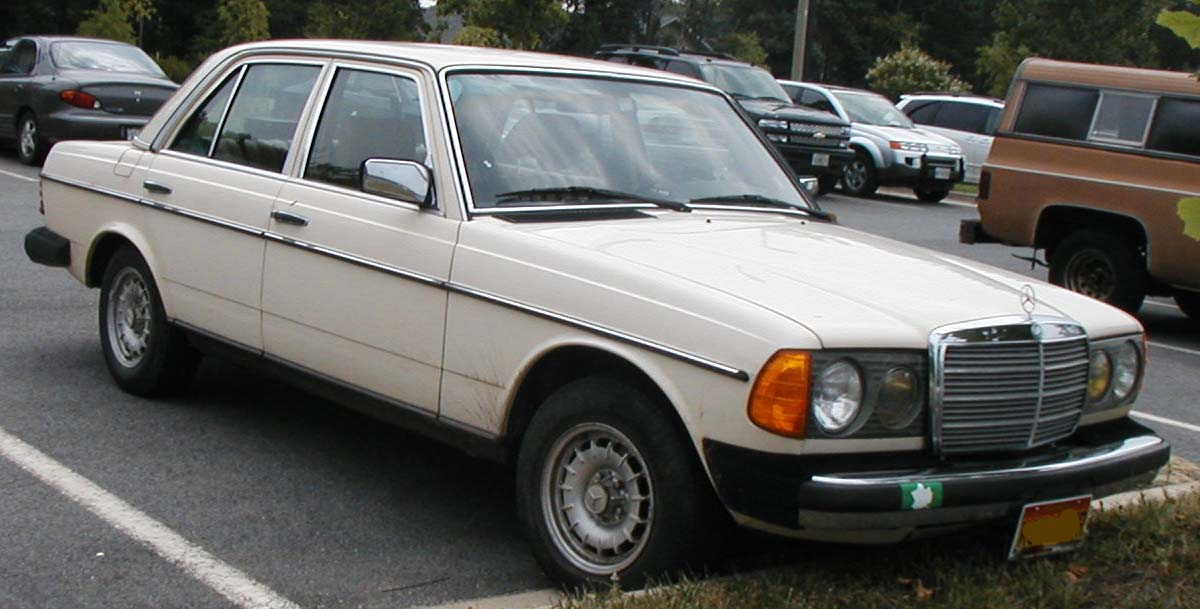 W666 Mercedes-Benz 240 Diesel photographed in USA.